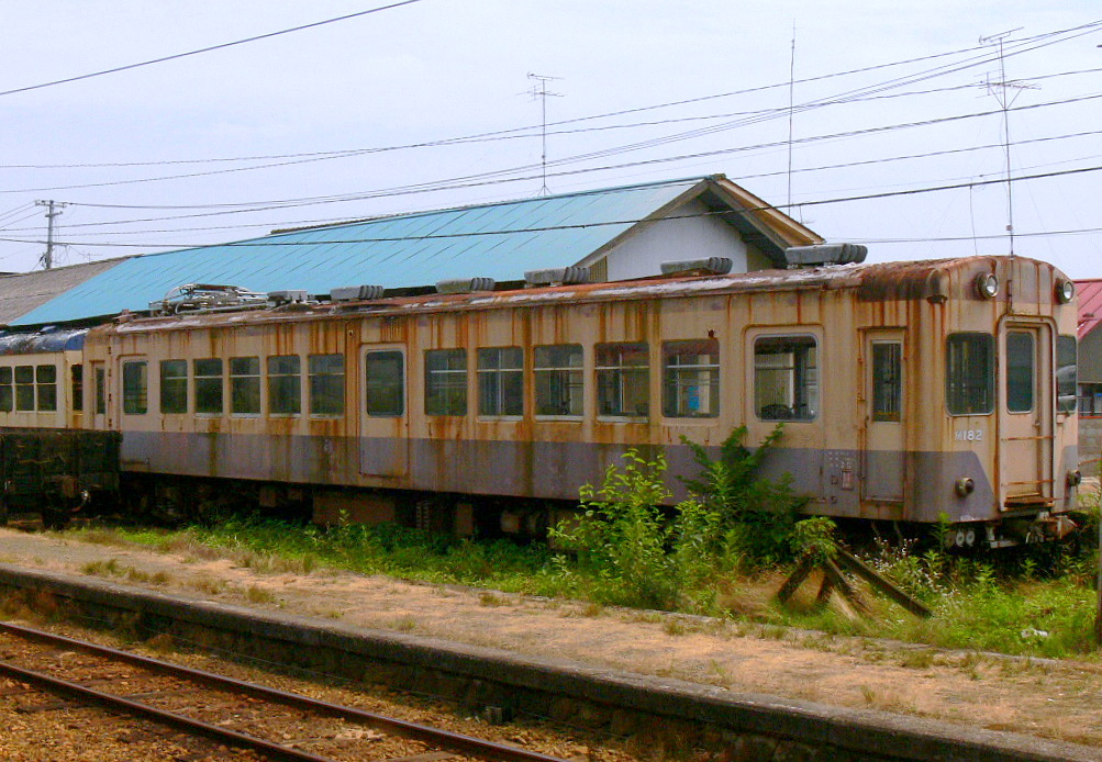 くりはら田園鉄道M182形電車。若柳駅にて。